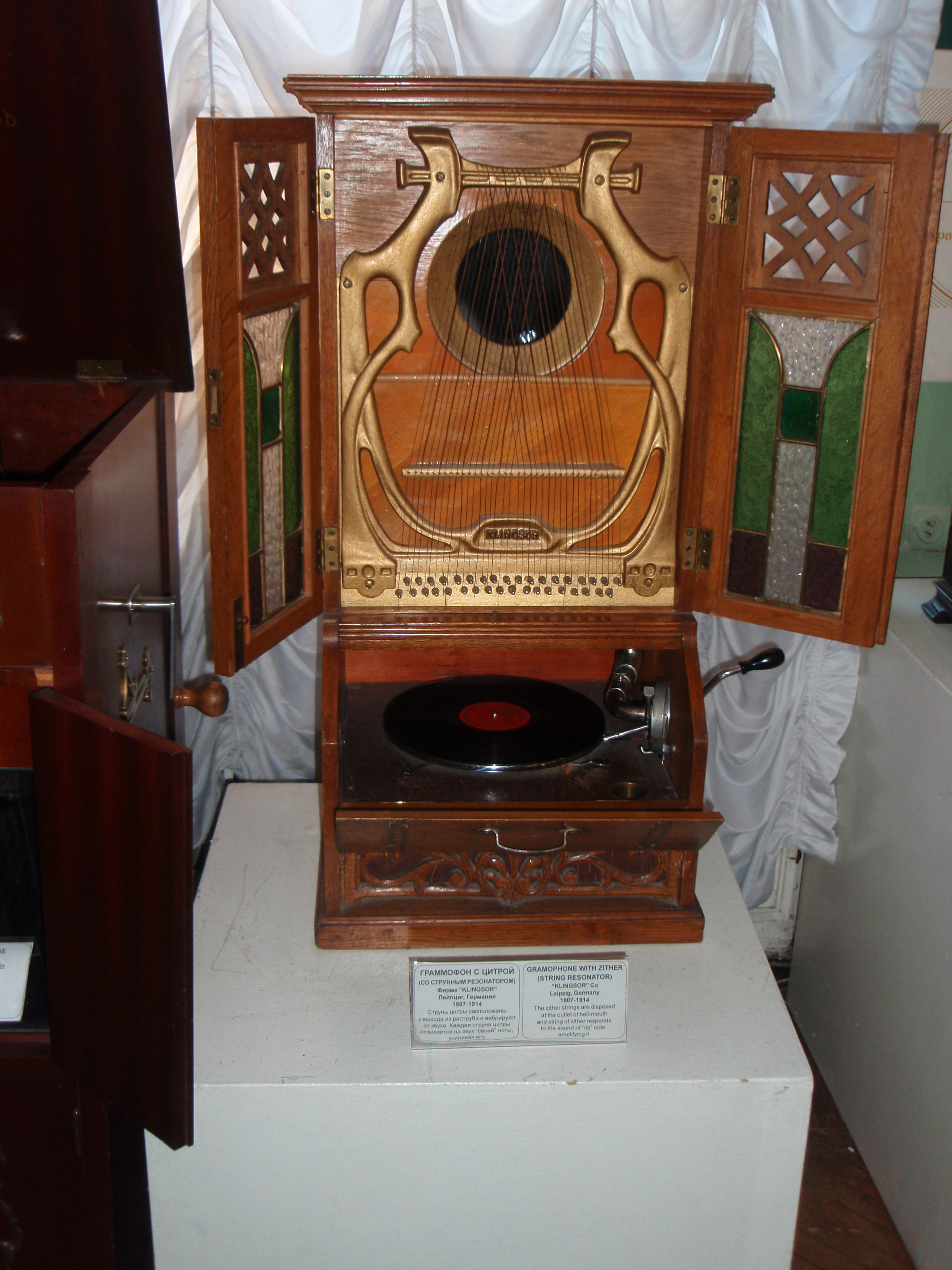 Граммофон с цитрой начала XX-го века, Государственный Политехнический музей (г.Москва)